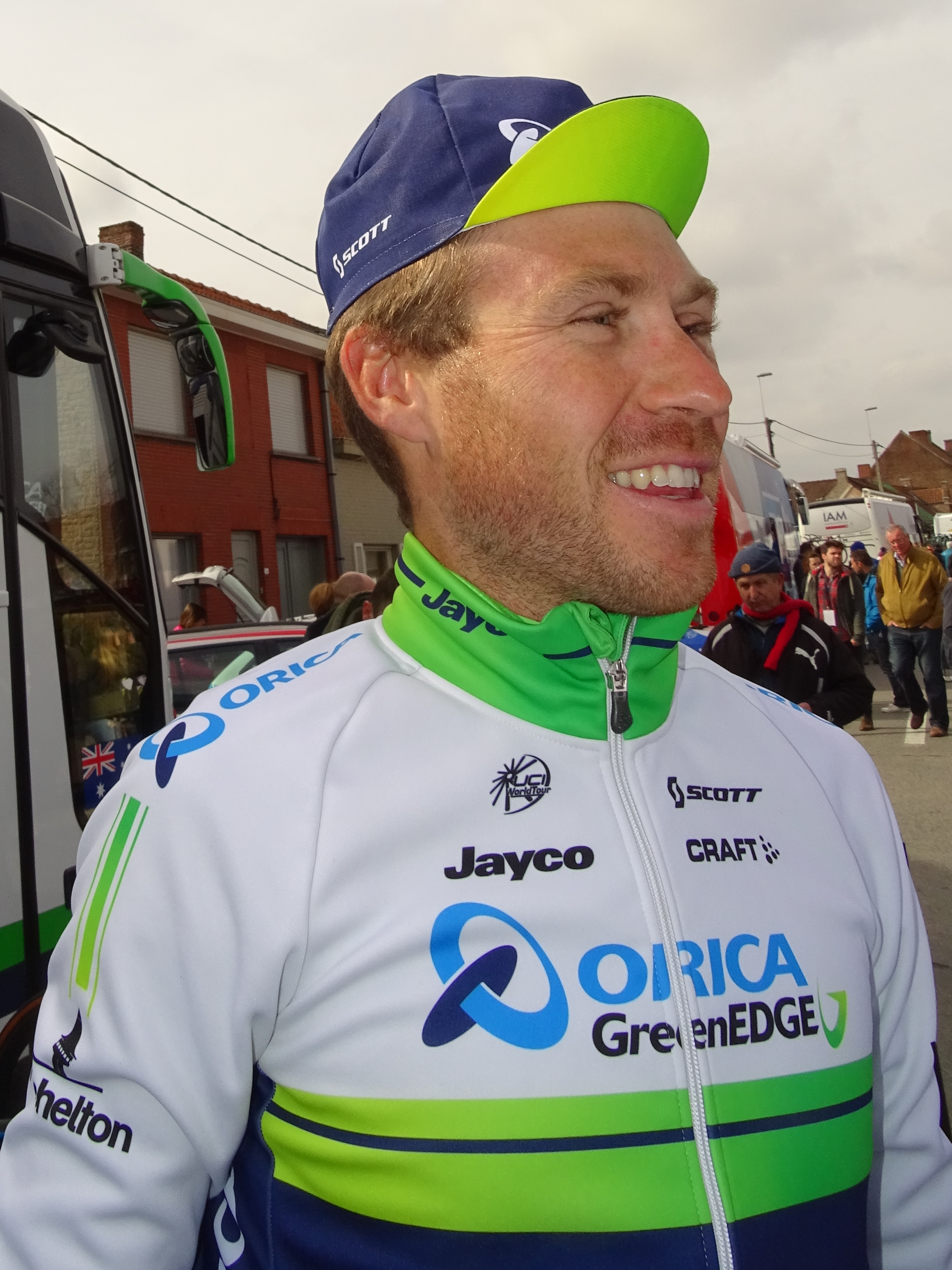 Reportage réalisé le vendredi 27 mars à l'occasion du départ et de l'arrivée du Grand Prix E3 2015 à Harelbeke, Belgique.